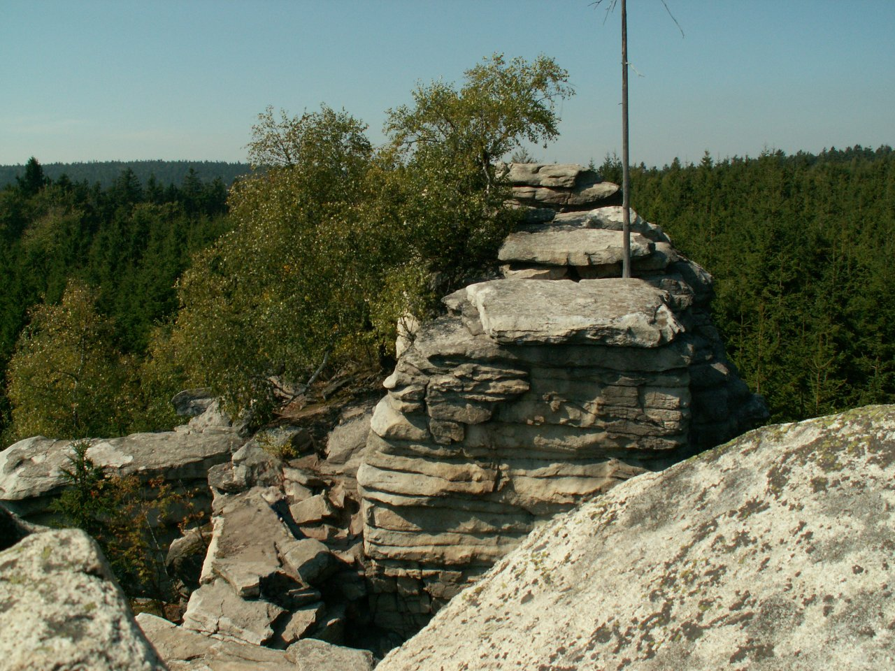 Míchova skála